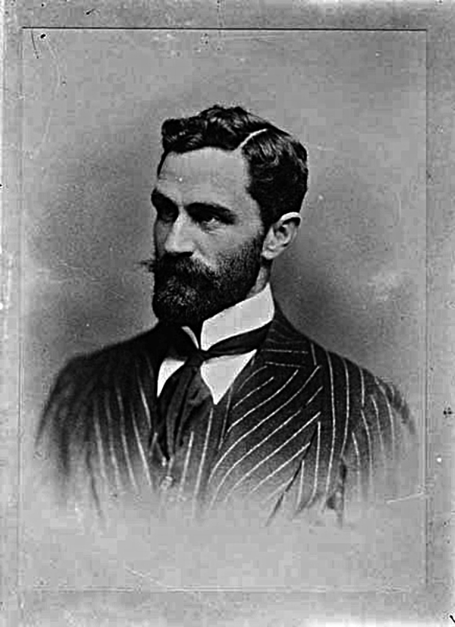 Photographie de Roger Casement.